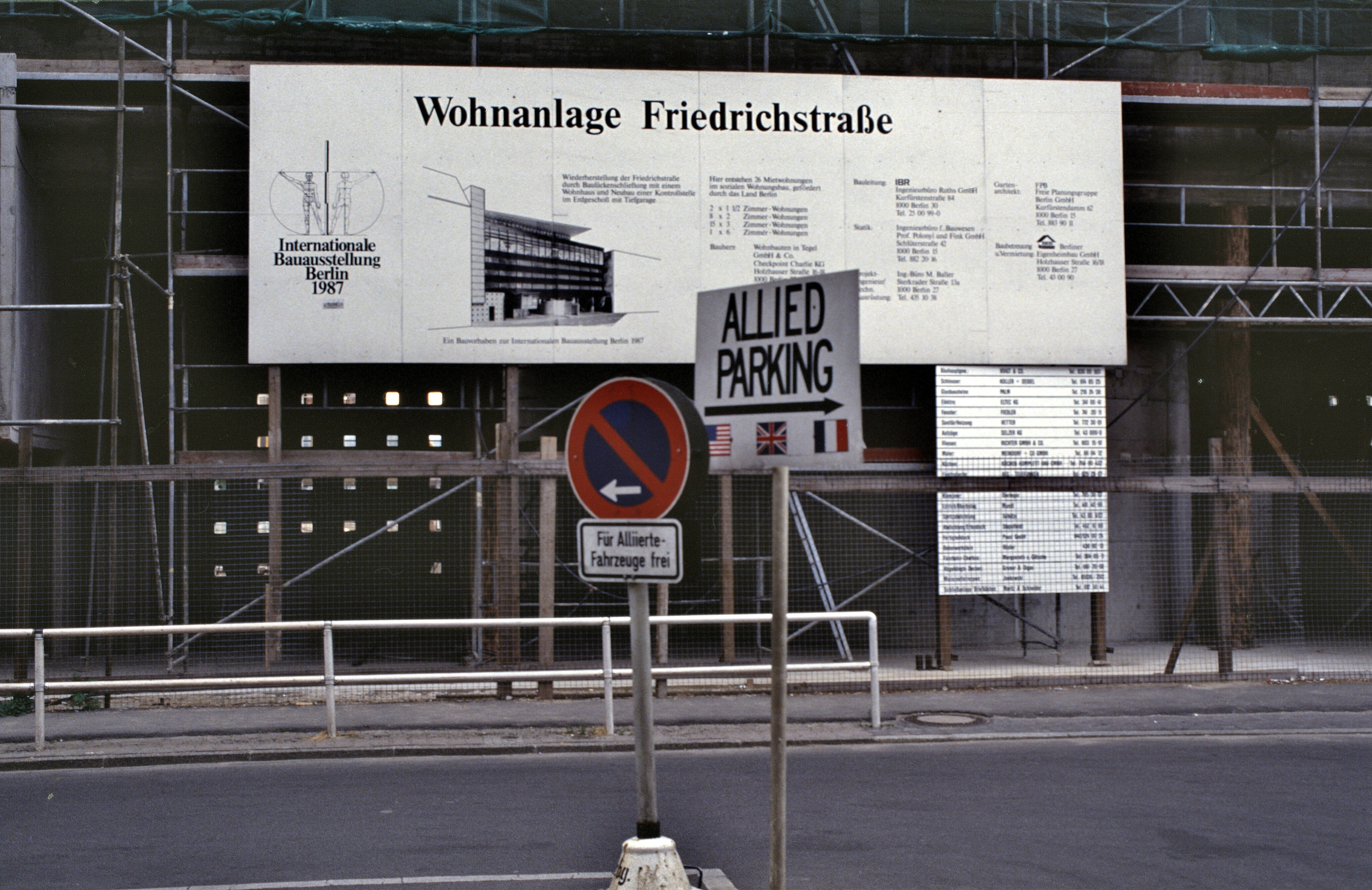 Baustelle "Wohnanlage Friedrichstraße" am Checkpoint Charlie. Ein Bauvorhaben zur Internationalen Bauausstellung Berlin 1987. Heute Wohnhaus am Checkpoint Charlie Baubeginn war 1987 und 1990 wurde der Bau fertiggestellt.